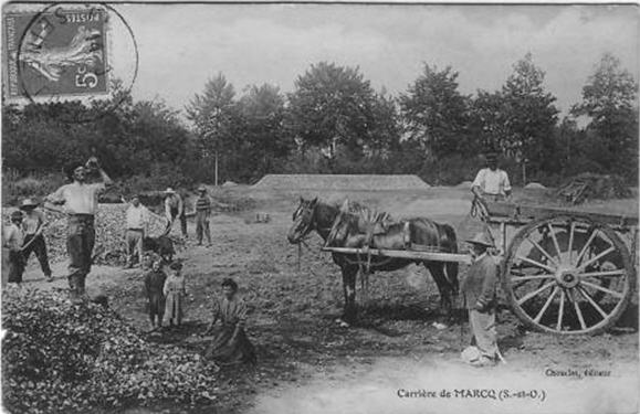 CPA sur la carrière de Marcq Yvelines